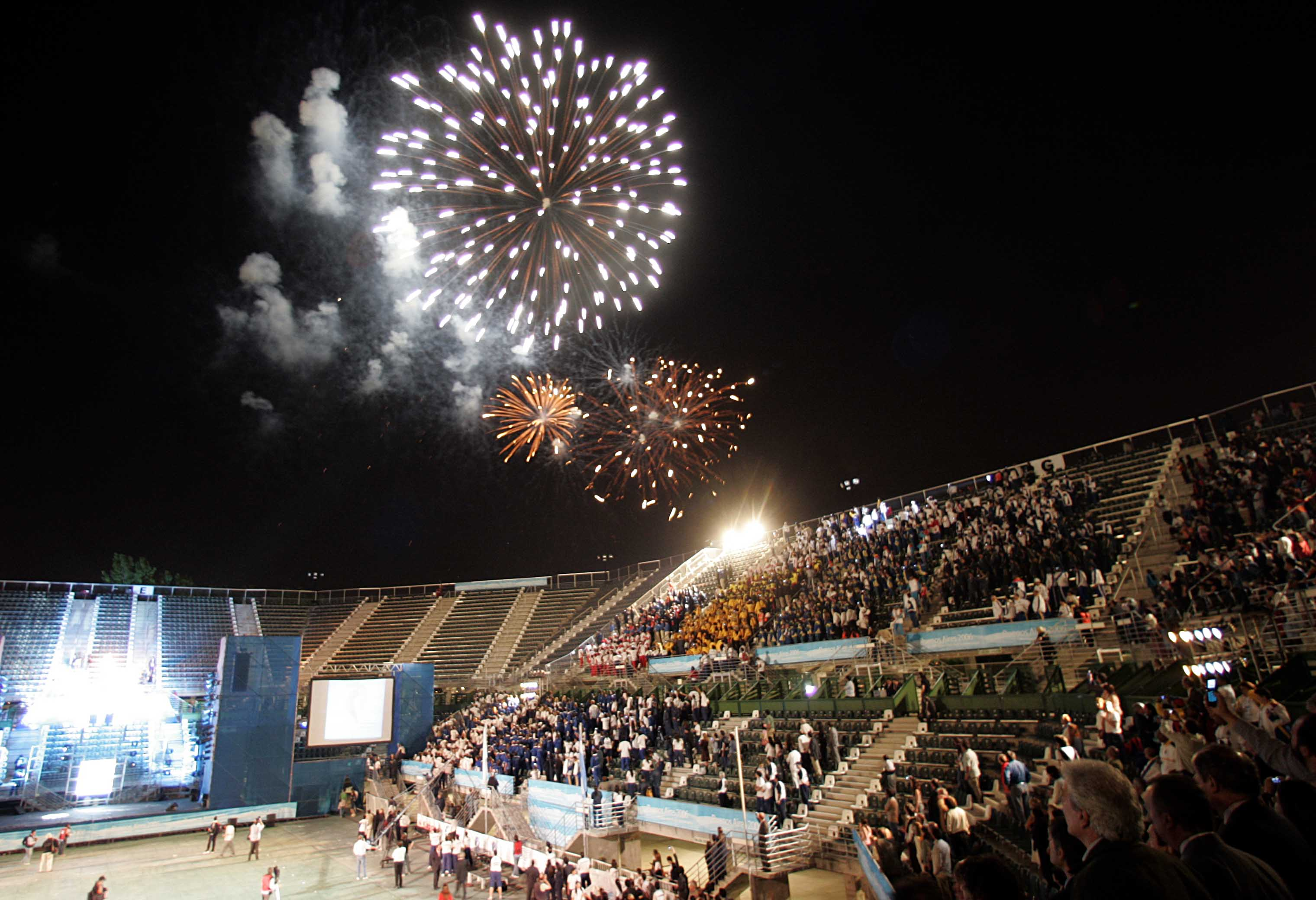 Imagen de la ceremonia inaugural de los Juegos Suramericanos Buenos Aires 2006, realizada en el Estadio Parque Roca.